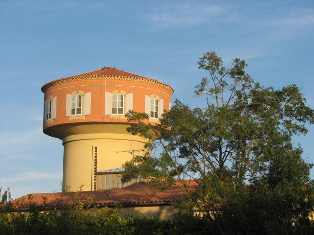 Vue du chateau d'eau alzonnais, et son célèbre trompe l'oeil